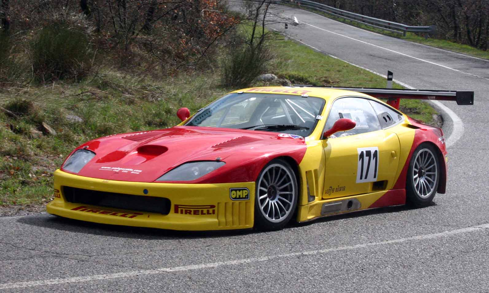 Ferrari Maranello preparata, categoria GT.